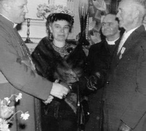 Octaaf Decock (rechts) met Bisschop Desmedt (links) in aanwezigheid van Alice Declercq en eerwaarde Dossaer. Foto zonder copyright, in veel families met oud-leerlingen van Meester Decock aanwezig.